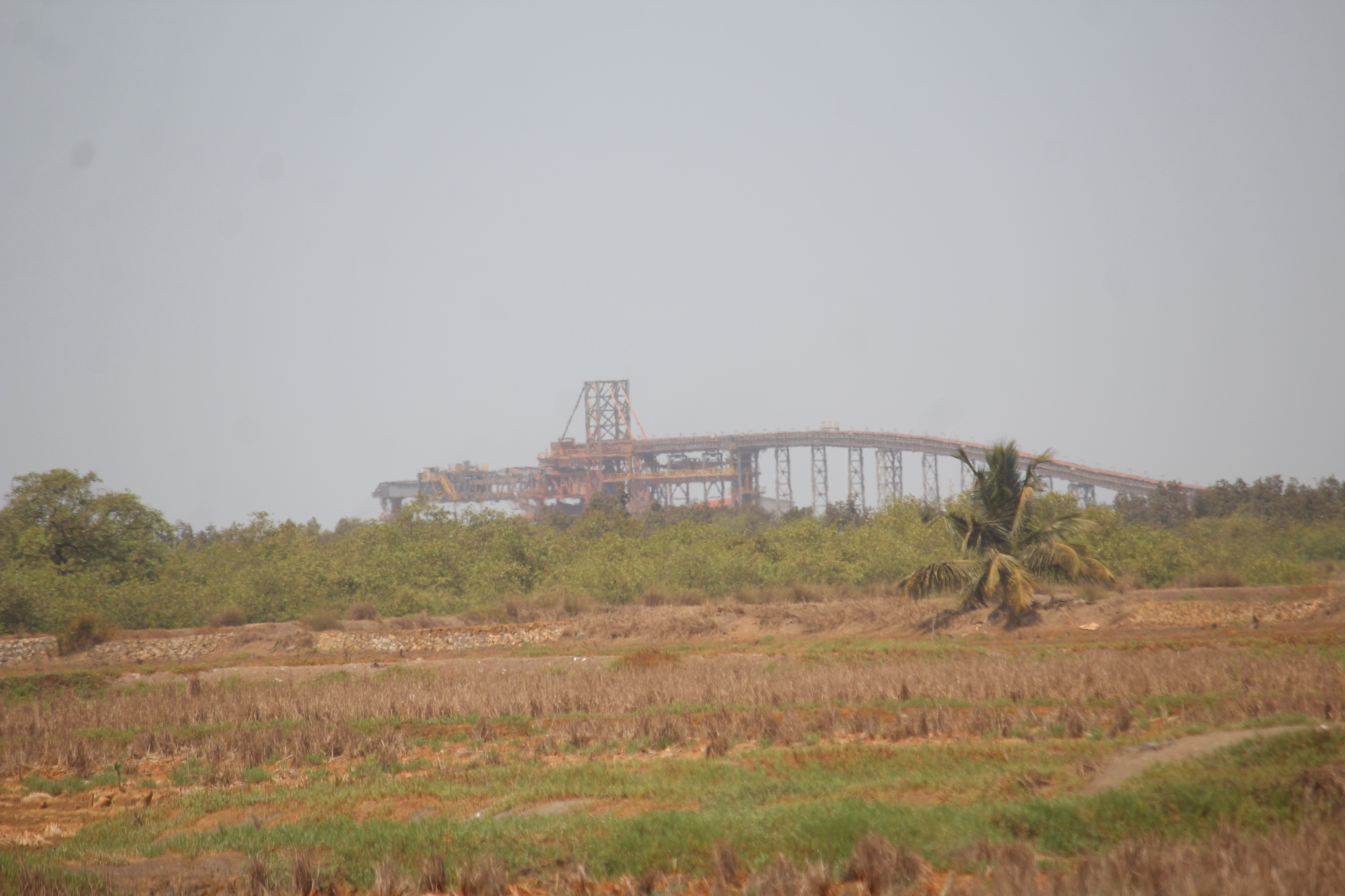 Tapis de GAC a kamsar This is an image with the theme "Africa on the Move or Transport" from: Guinea